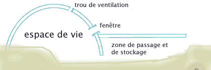 Image en coupe d'un igloo francisée Drawn by using PSP for Wikipedia